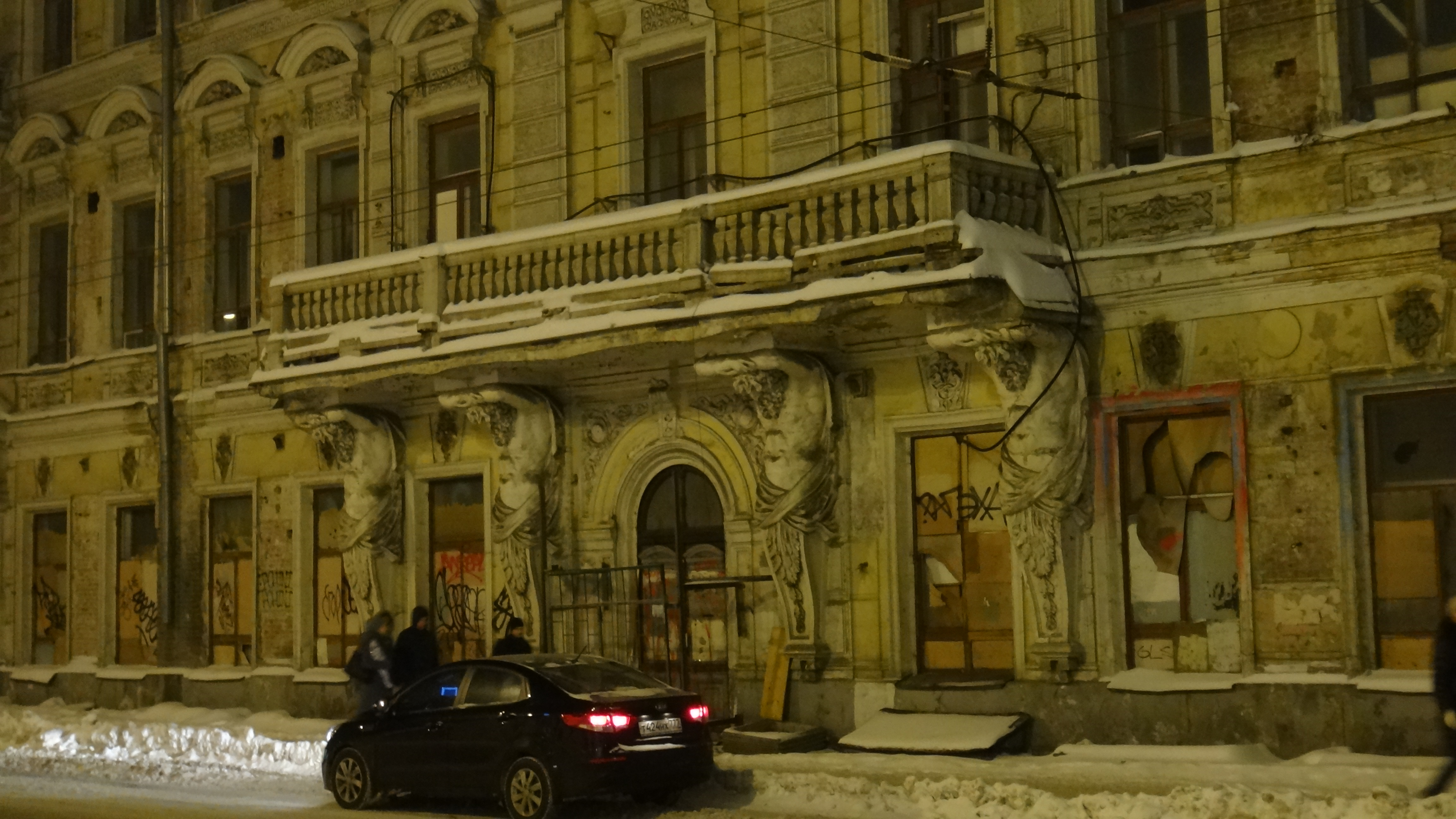 Tagansky District, Moscow, Russia - Солянка, 7. Бывший доходный дом Расторгуевых («Дом с атлантами»)